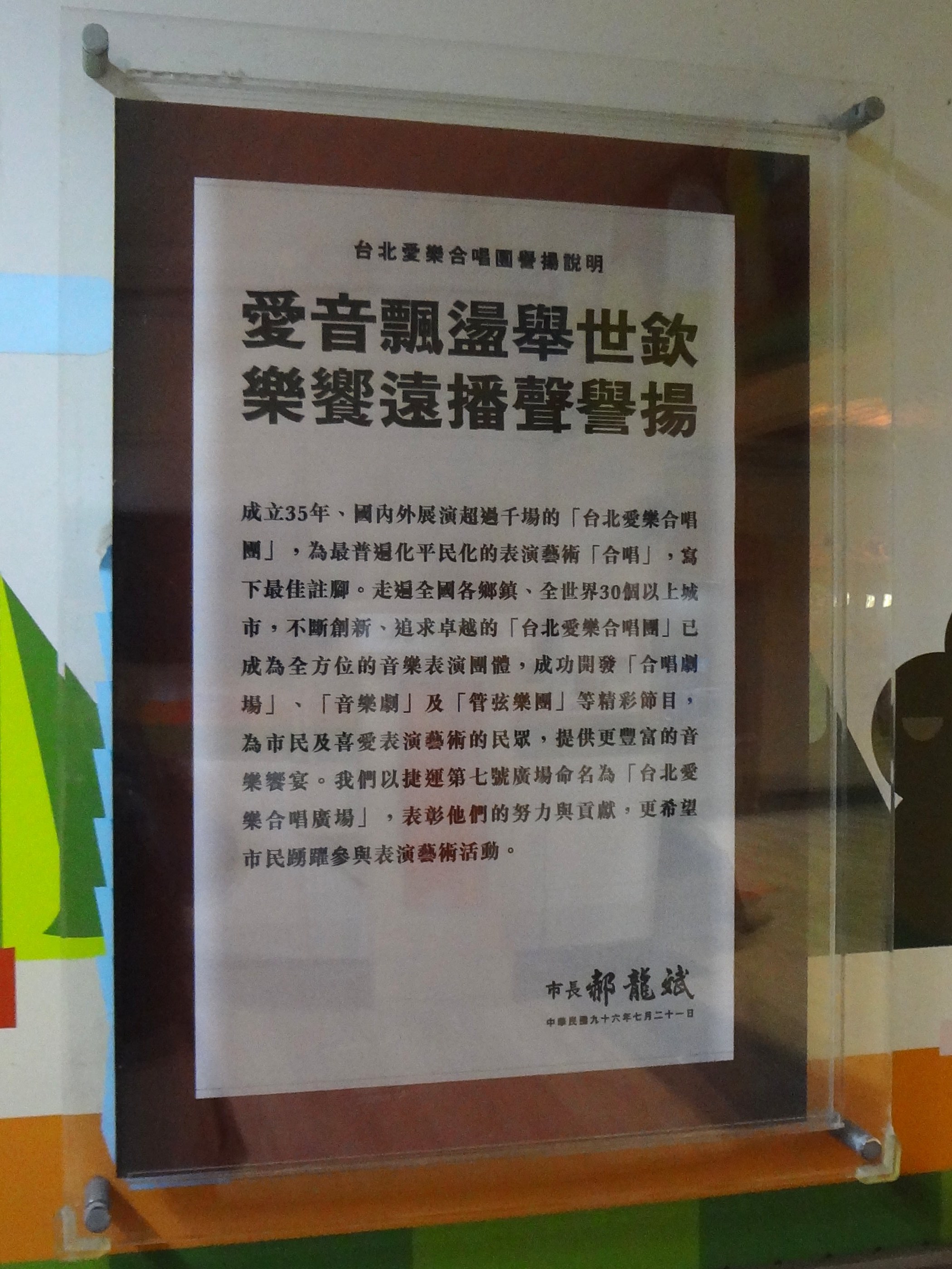 臺北市東區地下街第七廣場（臺北愛樂合唱廣場）《臺北愛樂合唱團譽揚說明》，2007年7月21日臺北市市長郝龍斌撰文。